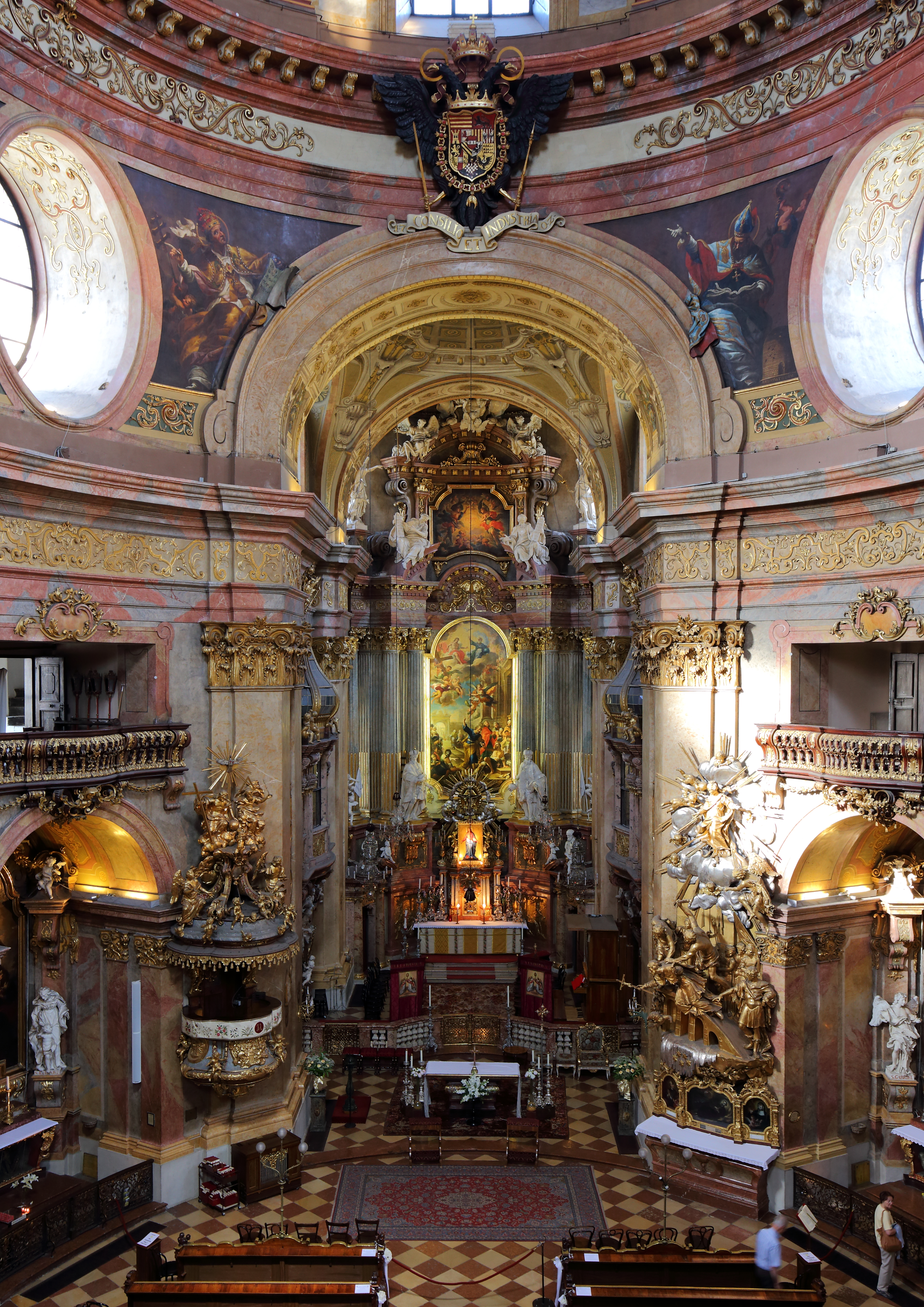 Hochaltar der Rektoratskirche St. Peter in der Bundeshauptstadt Wien. Der Aufbau des Hochaltars ist ein Werk von Antonio Galli da Bibiena und das Altarbild von Martino Altomonte. Weitere bedeutende Künstler, die an der barocke Ausstattung beteiligt waren, sind Matthias Steinl und Johann Michael Rottmayr. Die Kirche selbst, Wiens erster barocker Kuppelbau, wurde ab 1701 errichtet (ab 1703 nach Plänen von Johann Lucas von Hildebrandt) und 1733 vollendet sowie geweiht.